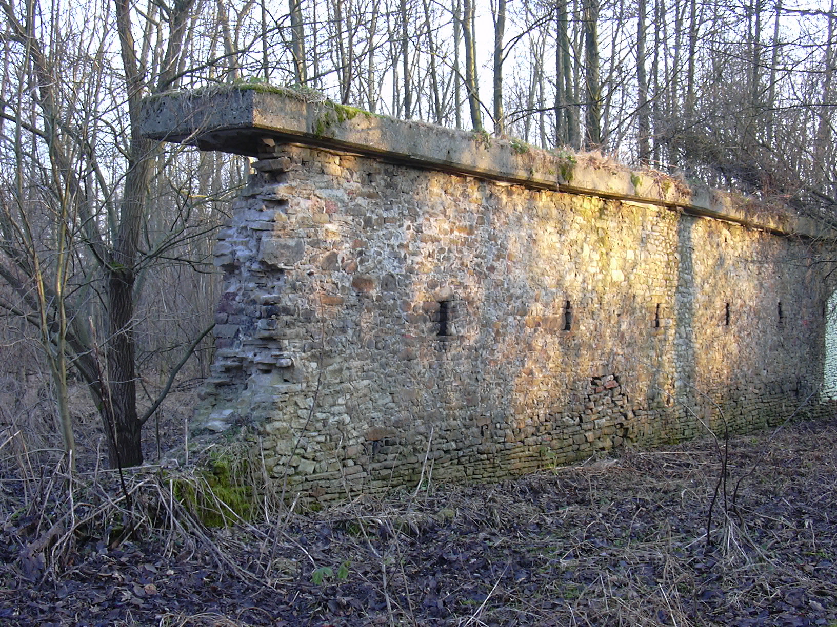 Die „Eulenmauer“, letztes sichtbares Zeugnis der Burg Rura (Haus Ruhr).